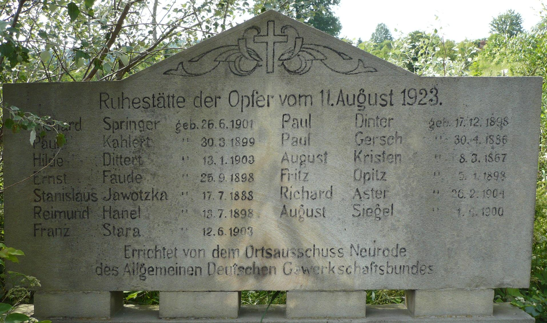 Nowa Ruda, ul. Cmentarna - cmentarz komunalny (pomnik 13 ofiar zajść z 1923 r.)